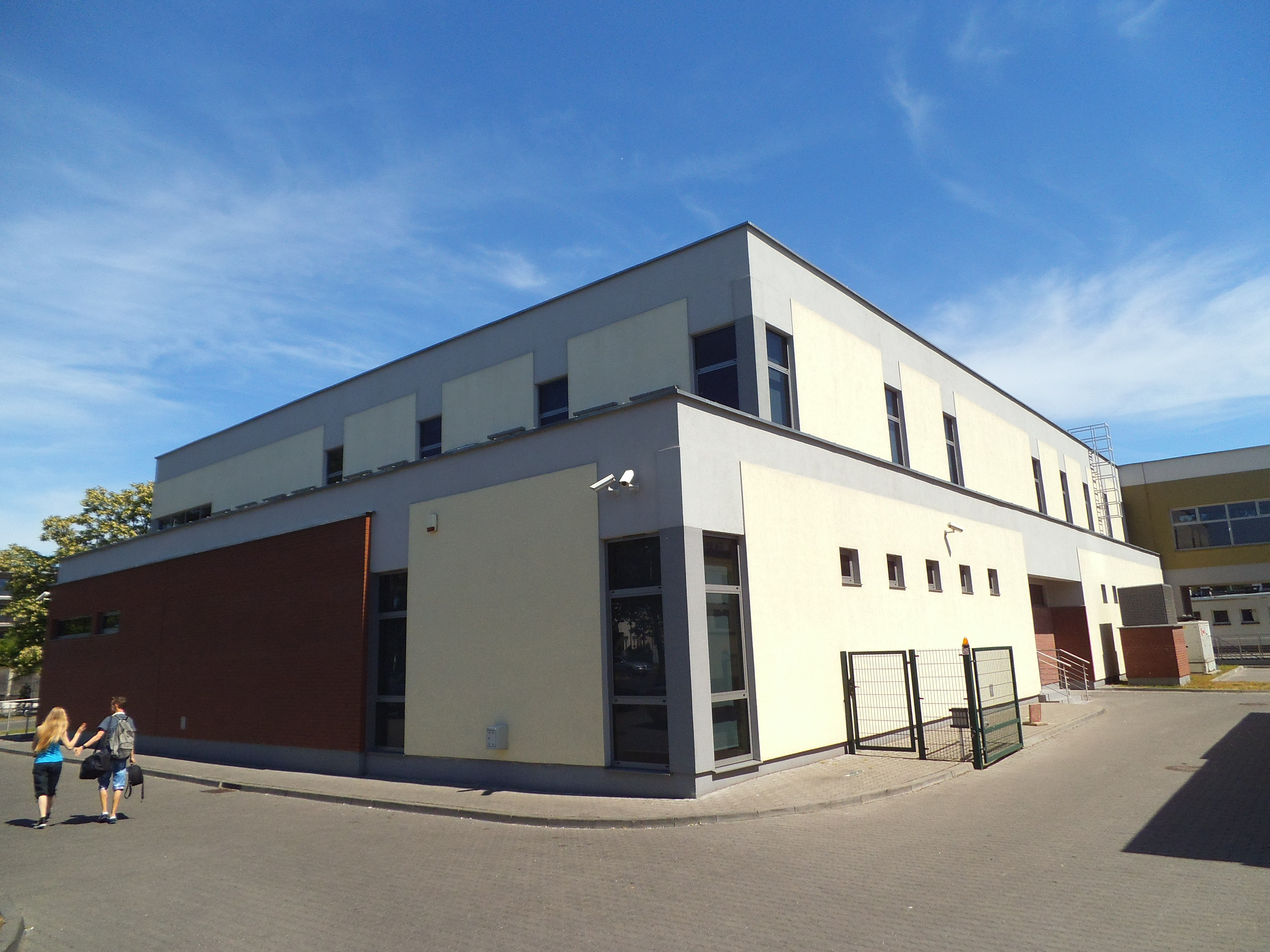 Zespół Szkół Muzycznych - sala koncertowa